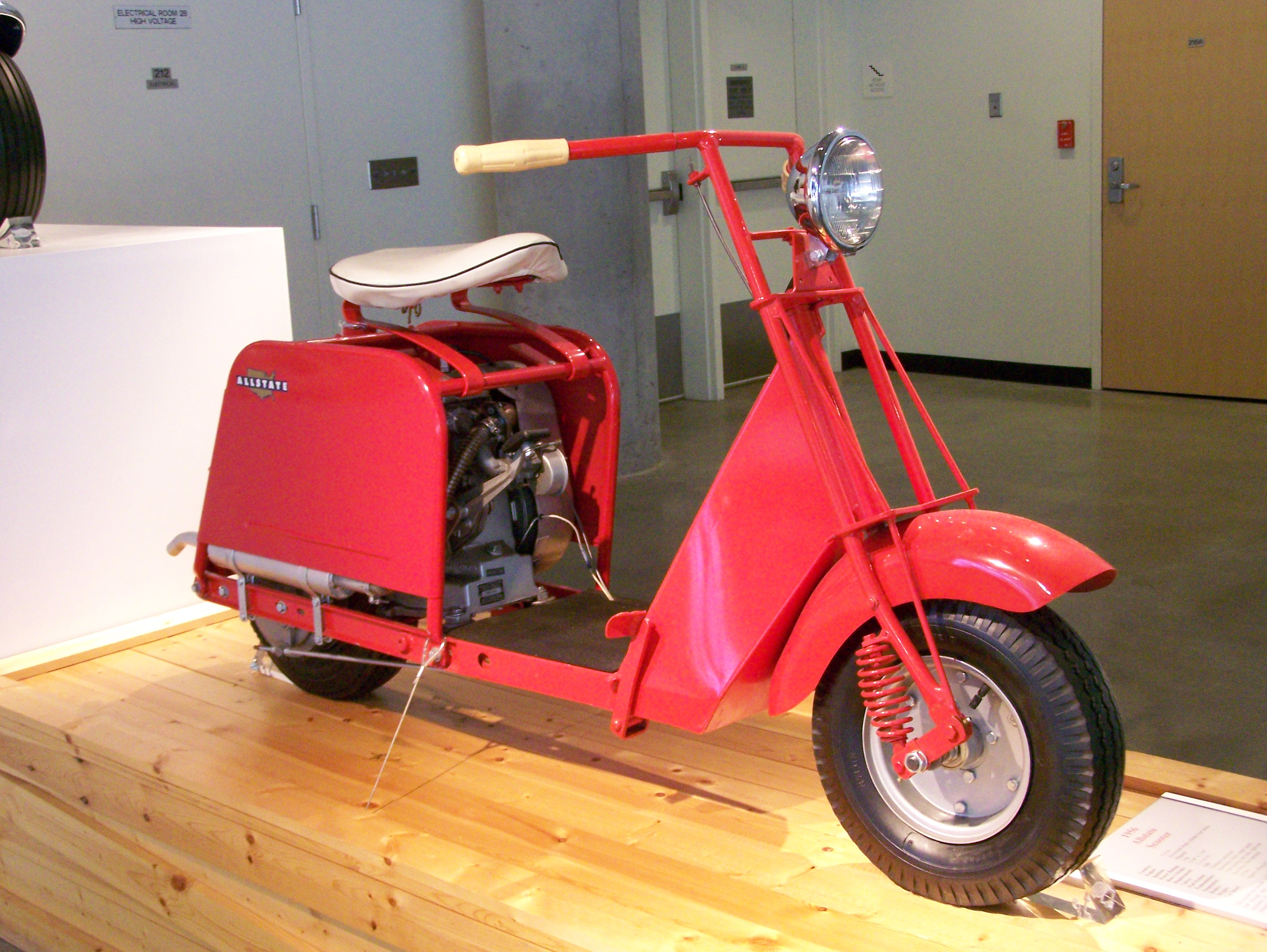 Barber Vintage Museum_522 1956 Allstate Scooter